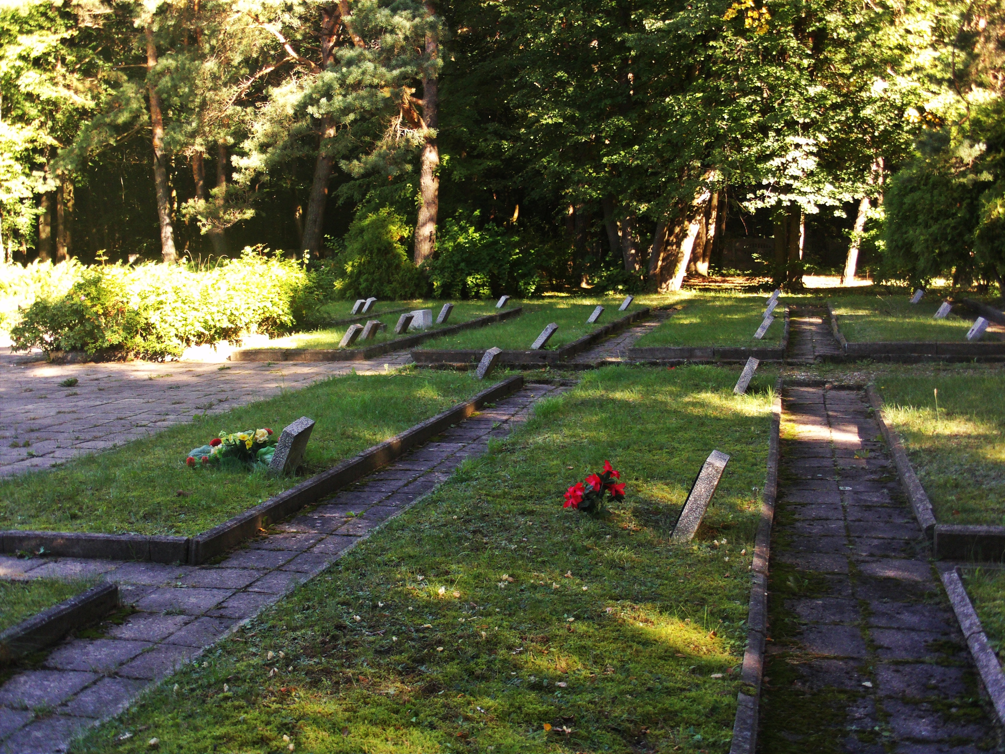 Suwałki - Cmentarz Żołnierzy Radzieckich w Suwałkach. Kwatery anonimowych jeńców. (zabytek nr A-832 z 26.08.1991)